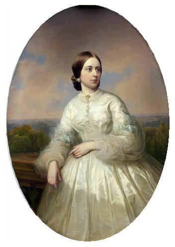 Графиня Елена Сергеевна Сумарокова (5.9.1829—15.4.1901), дочь генерал-адъютанта и генерала от артиллерии С. П. Сумарокова, была последней представительницей рода, замужем за генералом Ф.Н.Сумароковым-Эльстоном (1820 — 1877).